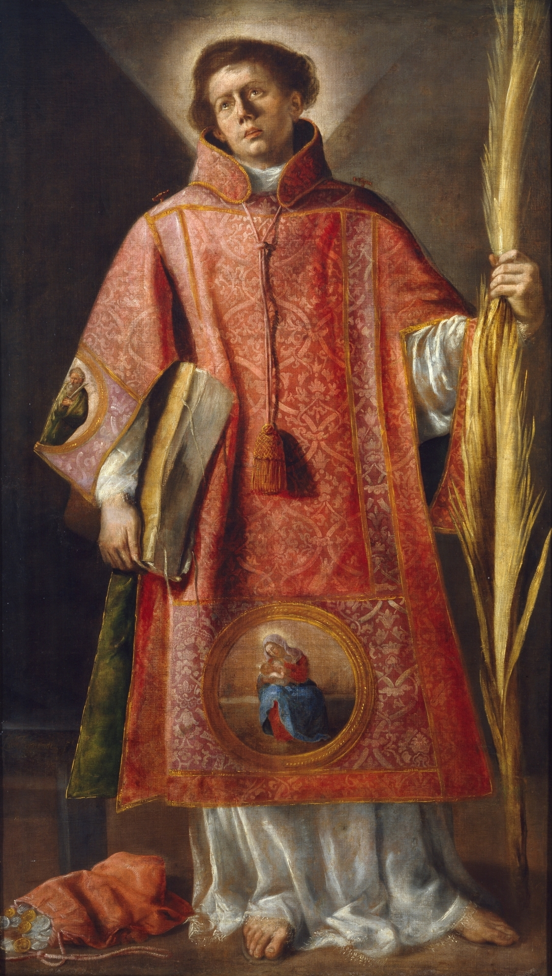 La obra representa al diácono y mártir San Lorenzo, que murió por profesar el cristianismo.